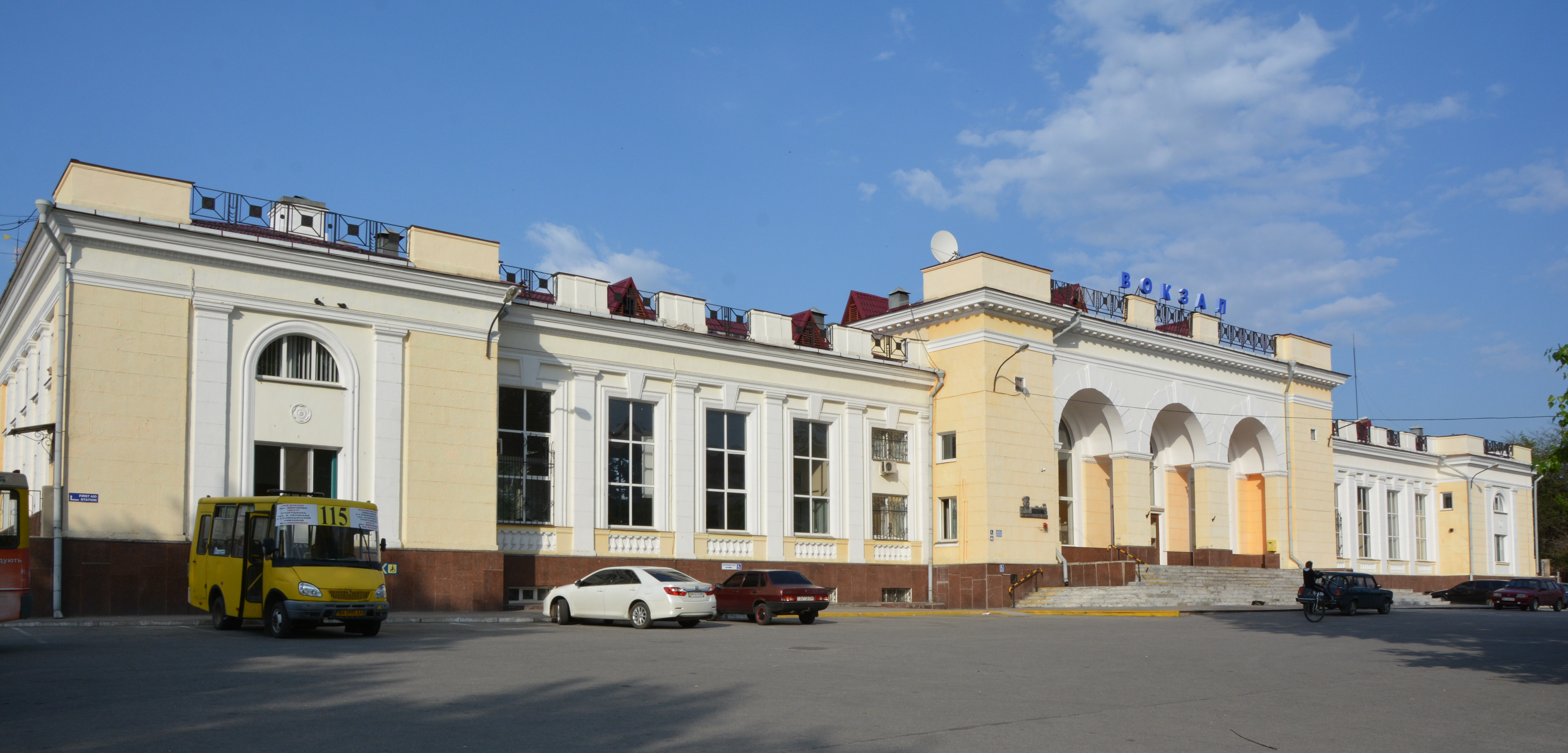 Залізничний вокзал, Кіровоград, вул. Поповича, 1